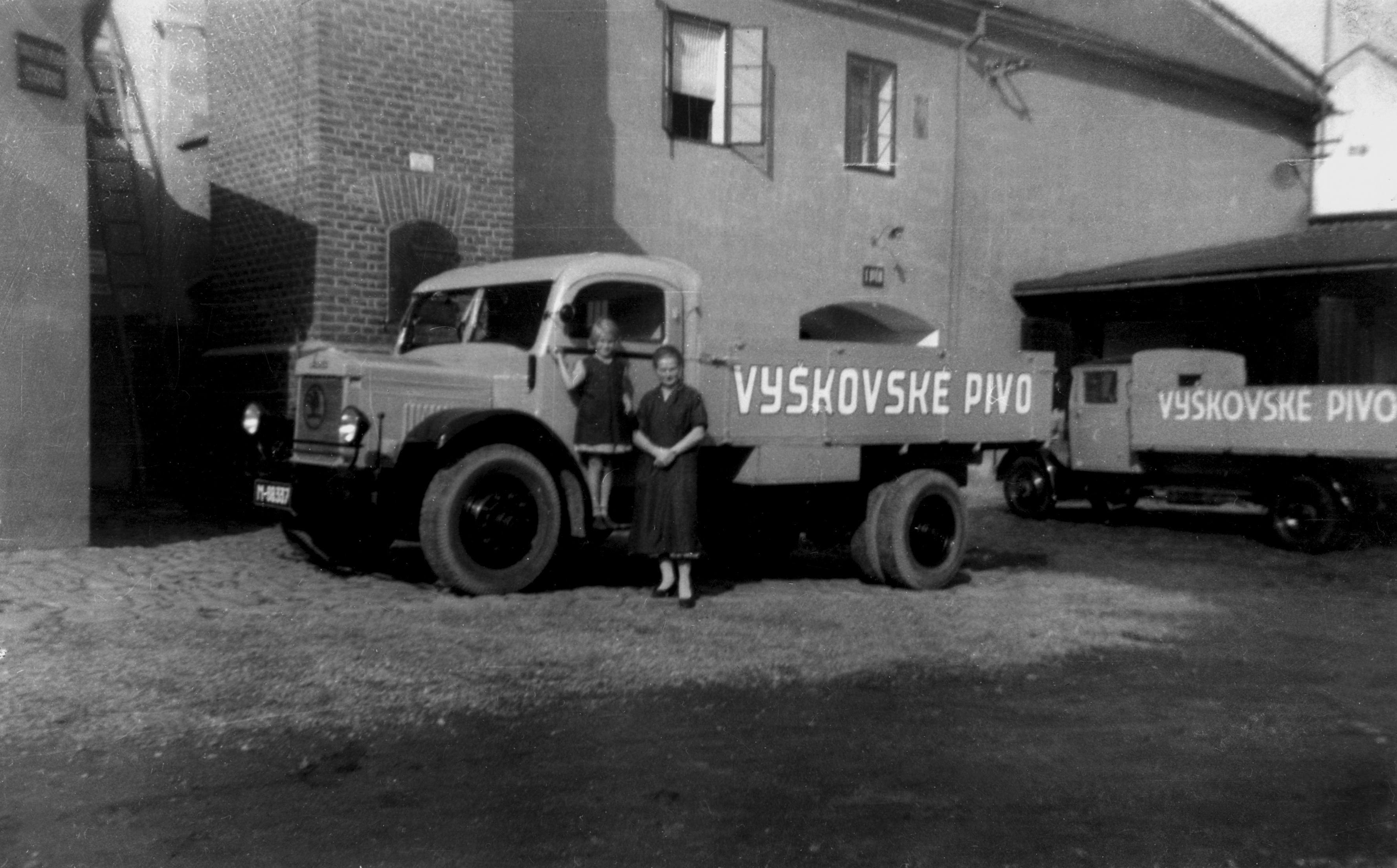 nákladní automobil zn. Škoda 1930 (Pivovar Vyškov- czech republic)